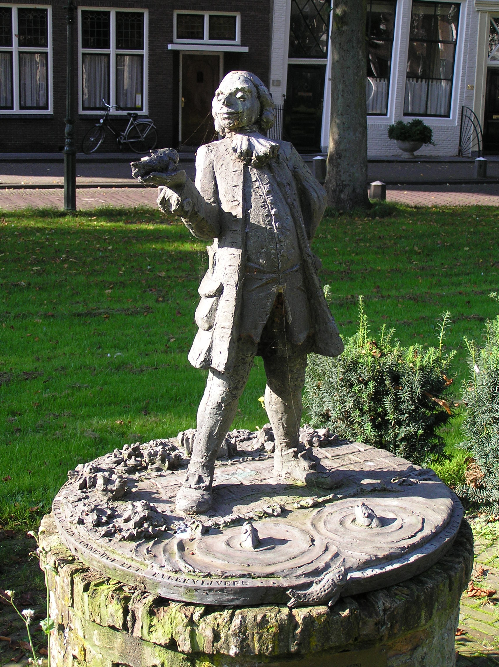 Beeld voorstellende Job Baster aan het Havenpark in Zierikzee. Gemaakt door Ad Braat.